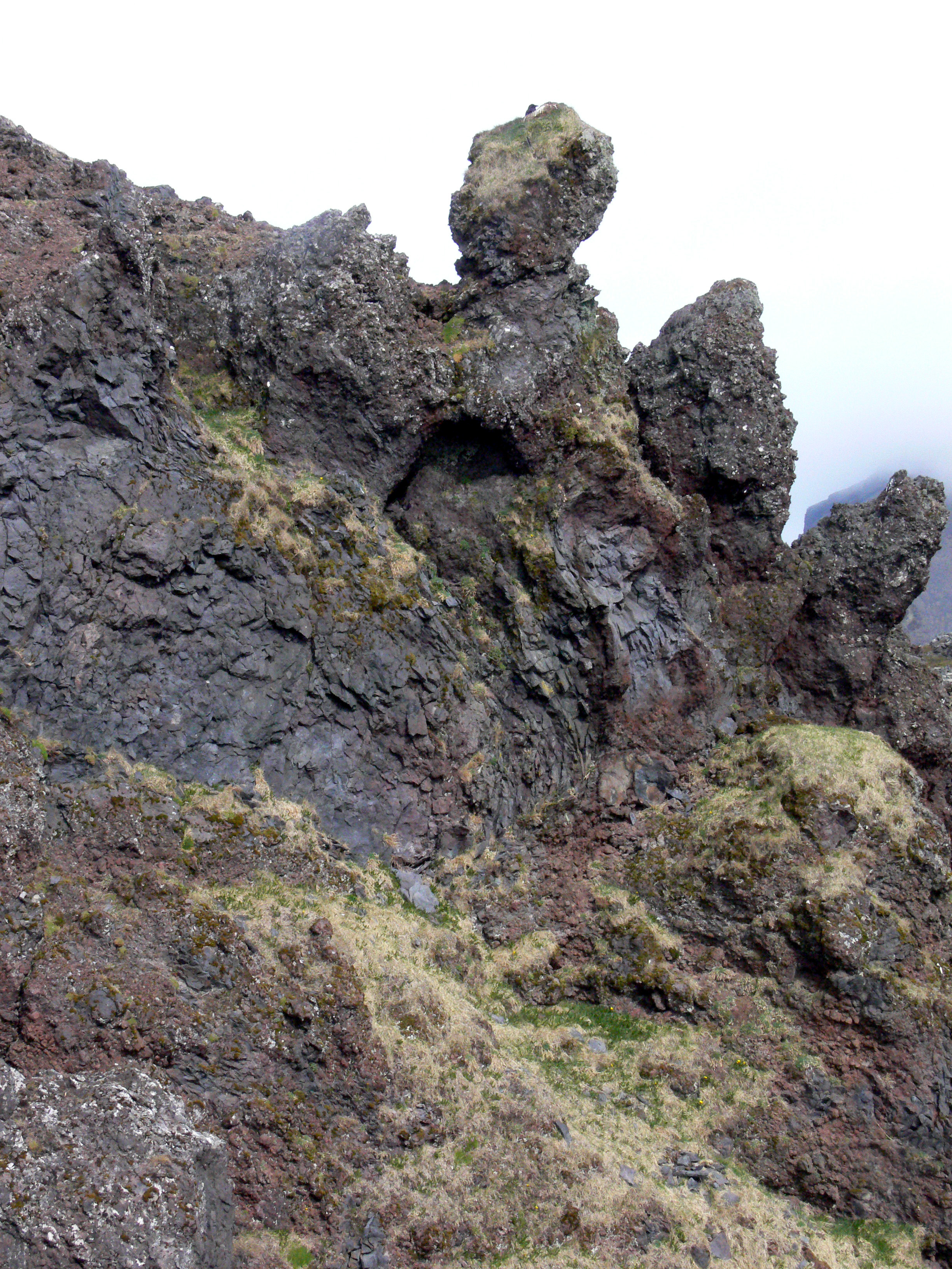 Küste zwischen Hellnar und Arnarstapi.